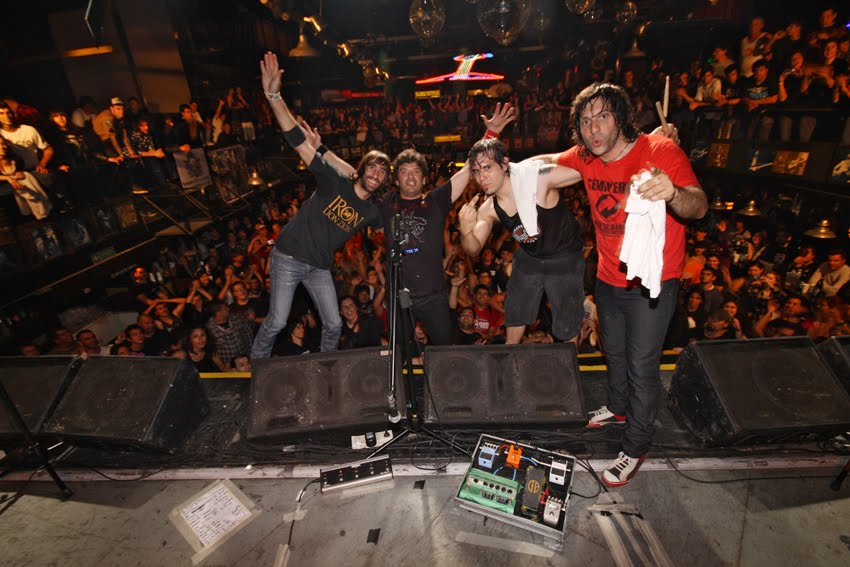 Bulldog en un show en Rosario